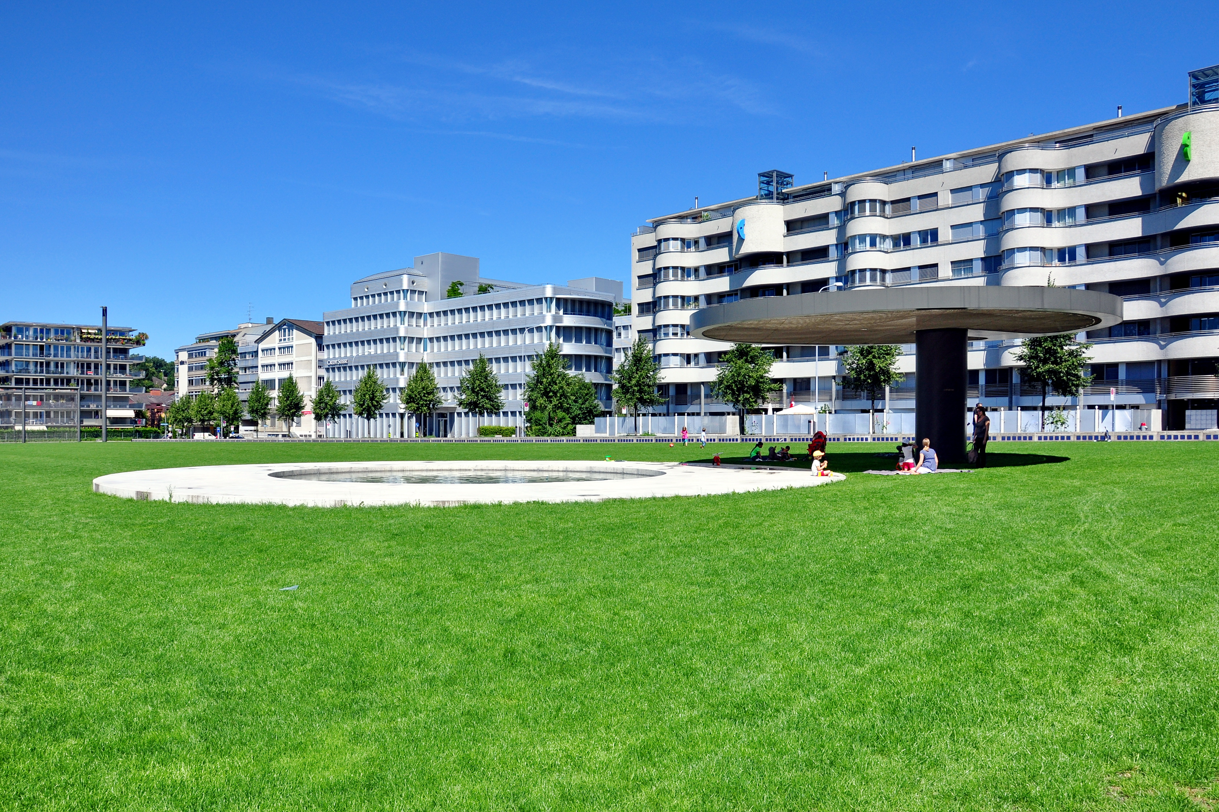 Zürich-Oerlikon (Zürich-Nord, Switzerland)